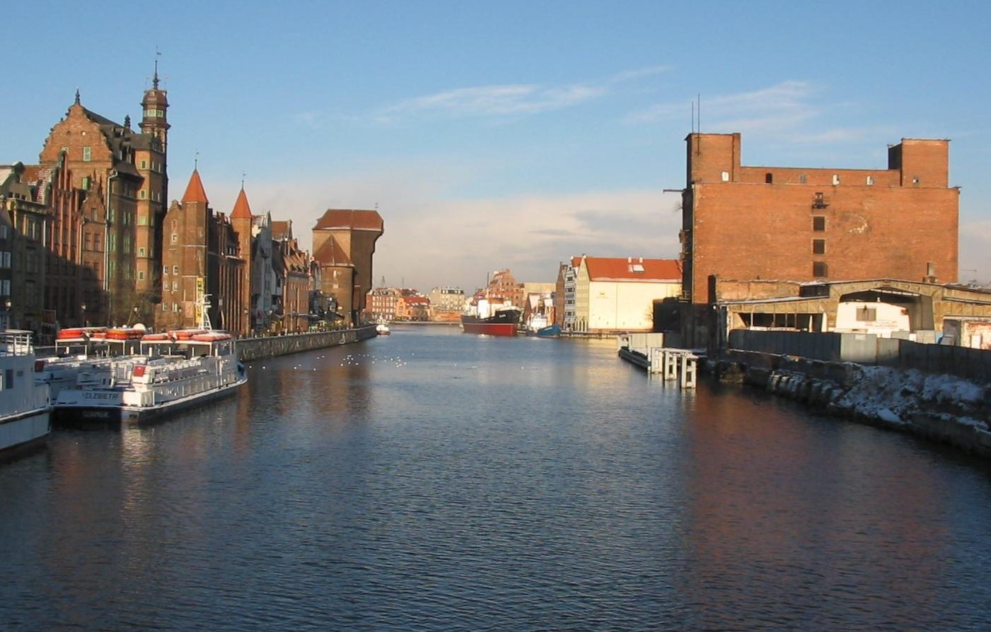 Gdansk